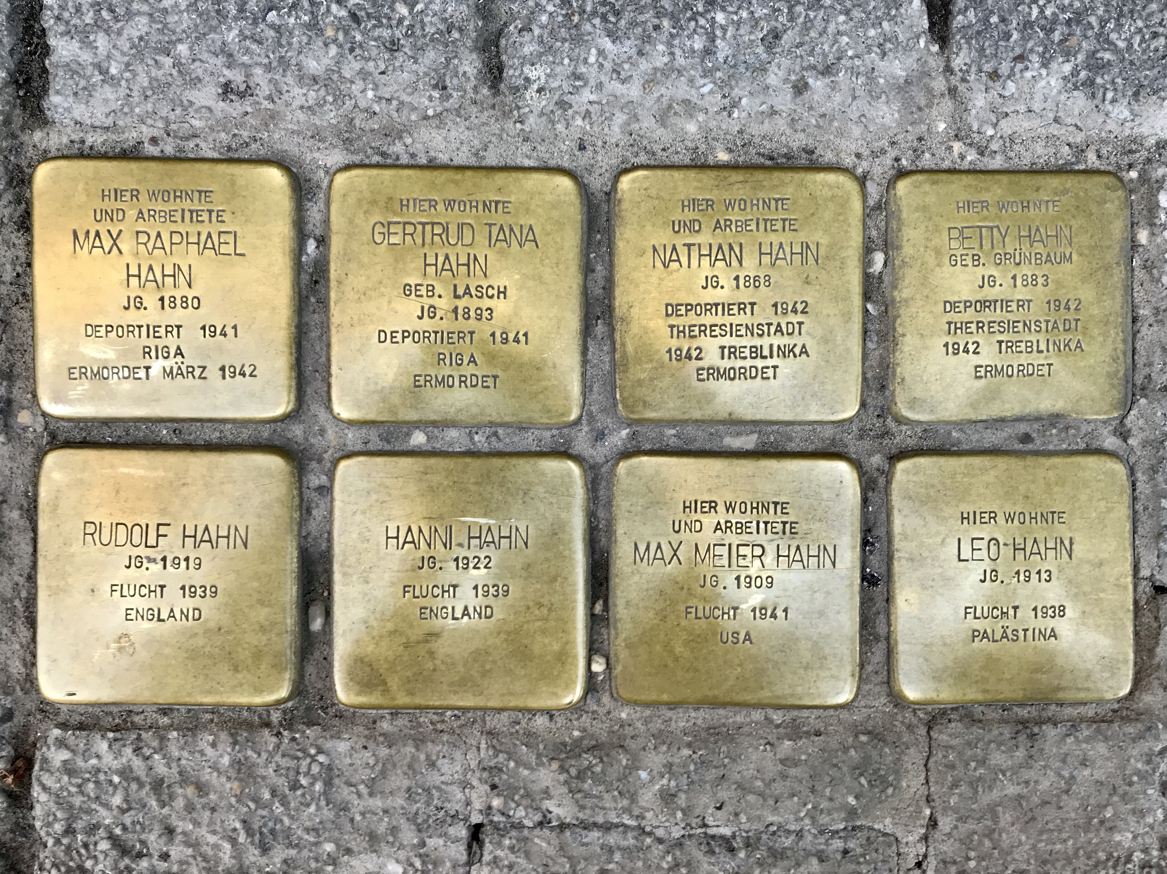 Stolpersteine vor dem Haus Weender Straße 70 in der Göttinger Innenstadt, verlegt von Gunter Demnig am 7. Februar 2018